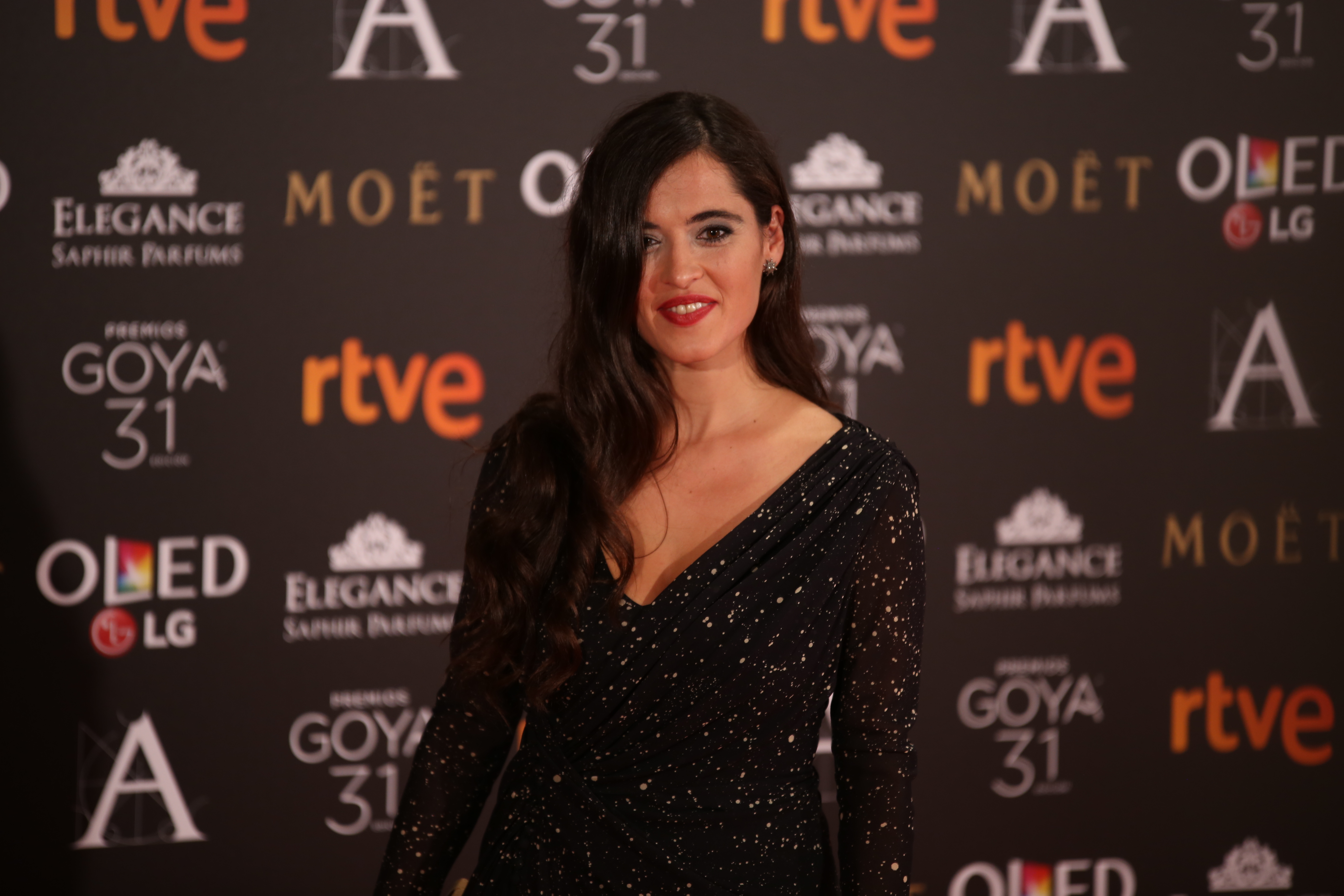 Premios Goya 2017